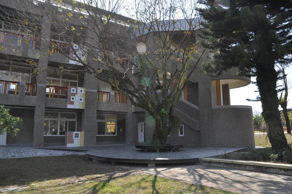 中文（台灣）: 福原國小一隅